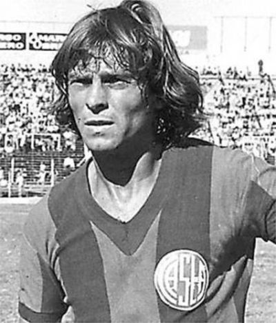 Narciso Horacio Doval